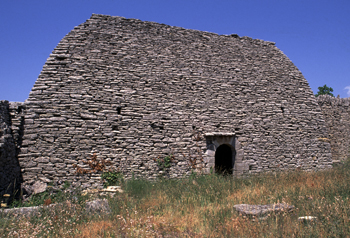 Grande nef gordoise à Gordes (Vaucluse),numérotée B-52 dans le recensement de l'abbé Verney. Photo de Dominique Repérant.